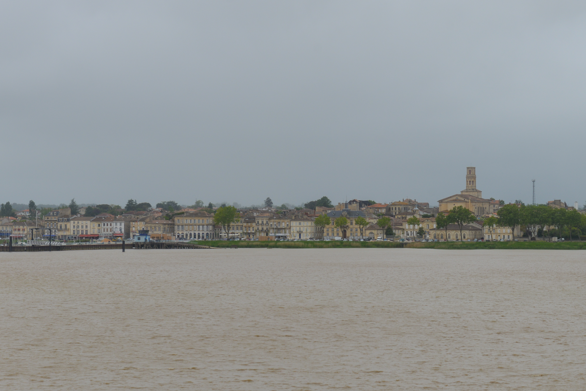 Pauillac, Gironde, France